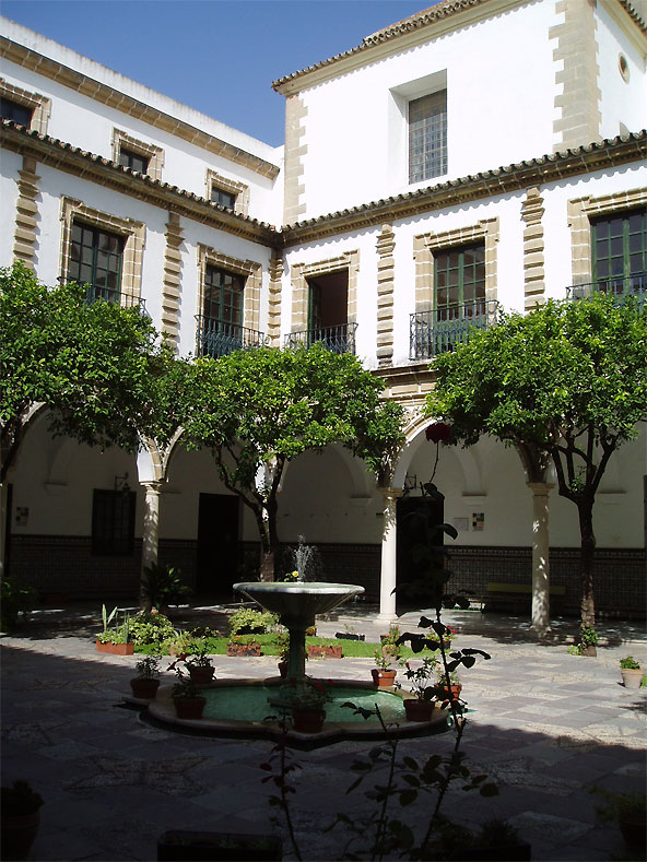 Patio del IES Santo Domingo, antiguo claustro del Convento de Sto. Domingo de El Puerto de Santa María, España. Edificio barroco de los ss. XVII-XVIII.